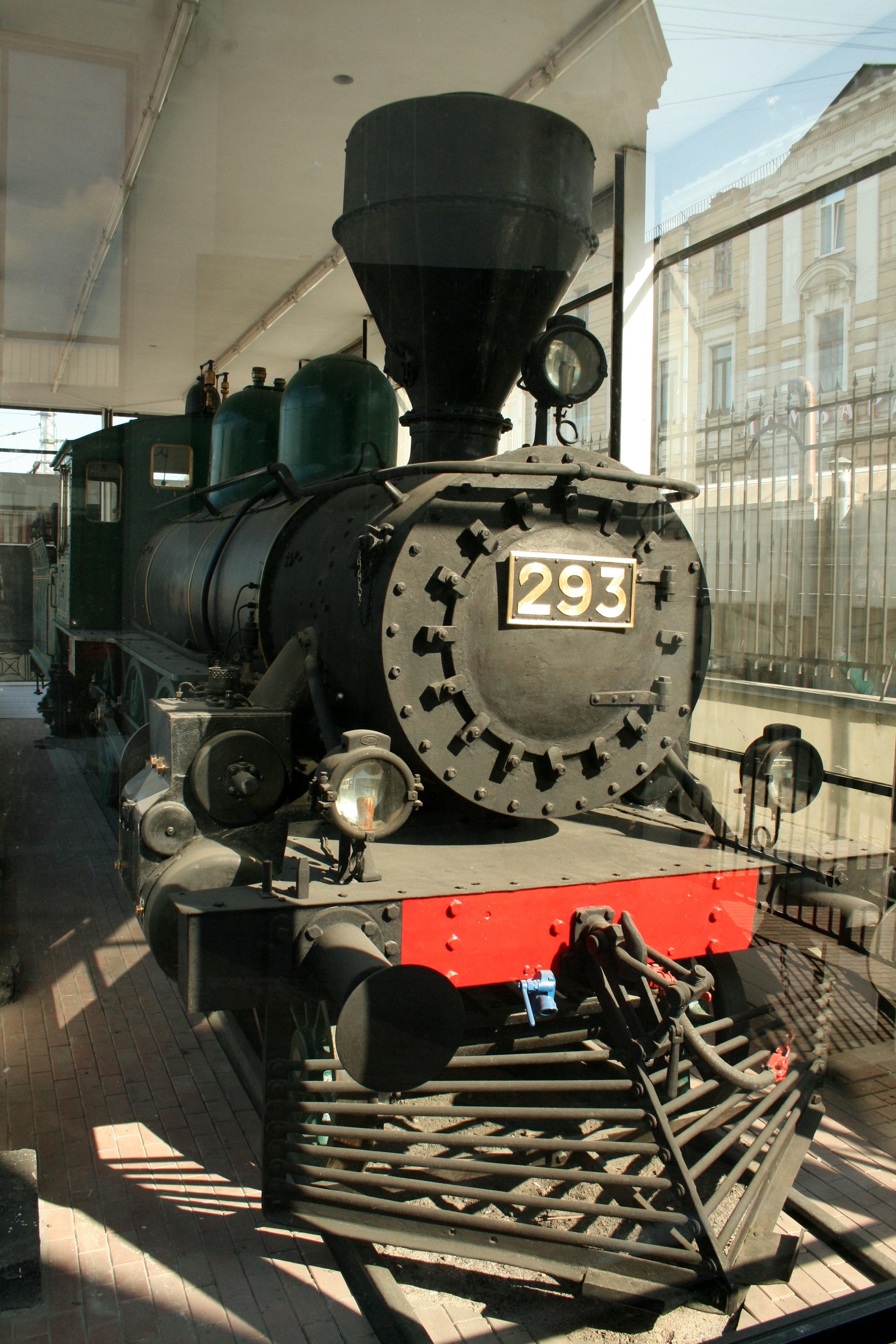 Паровоз М-293, на котором в августе 1917 г. Ленин В.И. выезжал в Финляндию и в октябре 1917 г. возвратился в Петроград: площадь Ленина, 6 (Финляндский вокзал, у платформы № 5), Калининский район, Санкт-Петербург